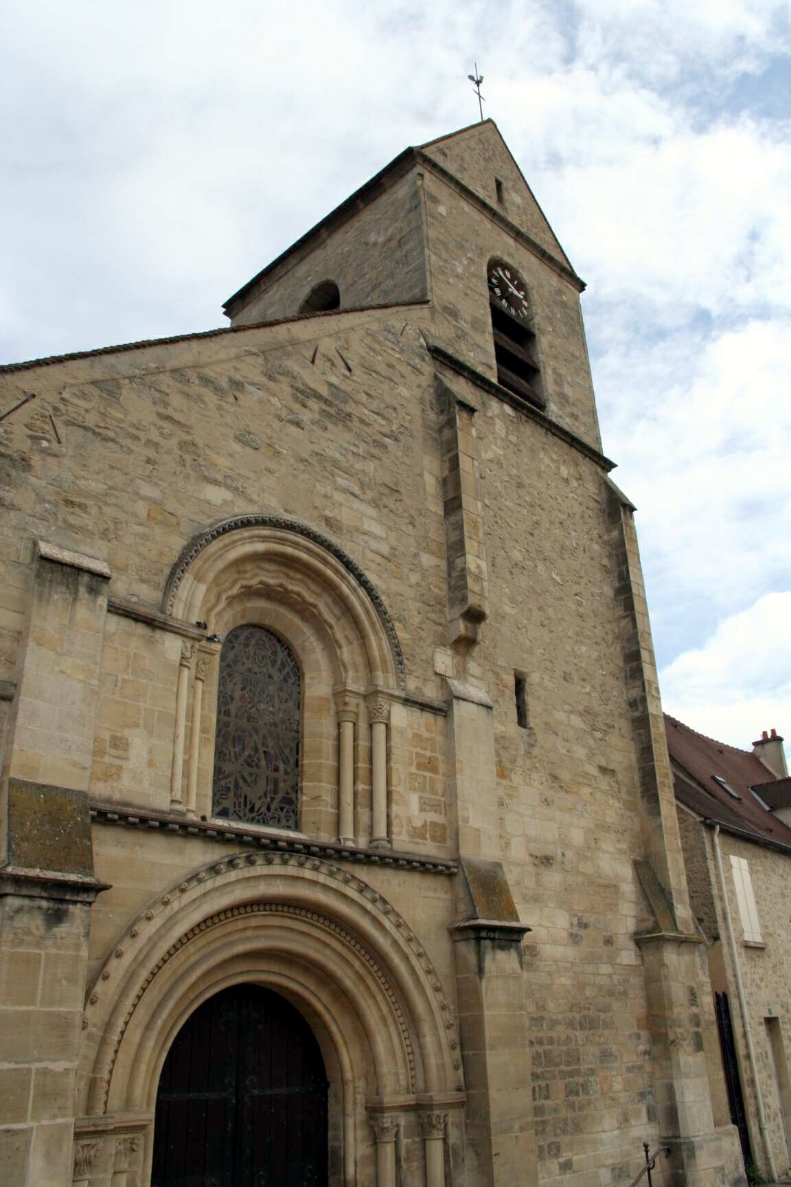 Église de Villennes-sur-Seine - Yvelines (France)